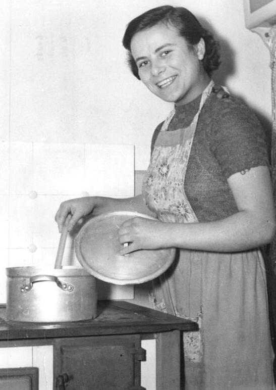 Zentralbild-Biscan. 21.1.1954 Landjugend treibt Sport. Die drei erfolgreichsten Sportwerbegruppen der Betriebssportgemeinschaft Traktor im Bezirk Magdeburg - die Sportwerbegruppen von Ottersleben, Kroppenstedt und Barssel - trafen sich in Magdeburg zur 1. Bezirks-Ausscheidung. Der Wettstreit, der einen guten Einblick in den Leistungsstand des Sports der Landjugend gewährte, endete mit einem knappen Sieg von Ottersleben vor Barssel und Kroppenstedt. UBz.: Marion Kämpfer, die Beste der SV Traktor im Bodenturnen und Pferdseitspringen, arbeitet im Haushalt eines Lehrers in Kroppenstedt.